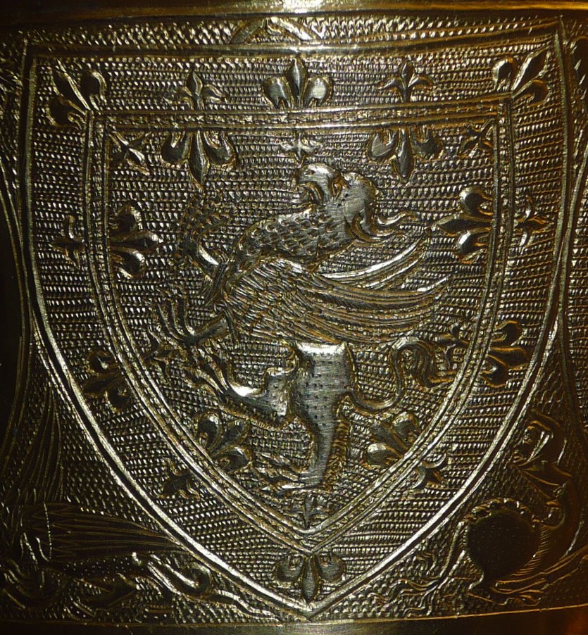 Våpenskjoldet til Bjarne Erlingsson på et drikkehorn i Nationalmuseet i København.